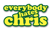 Logotipo da série norte-americana "Everybody Hates Chris".